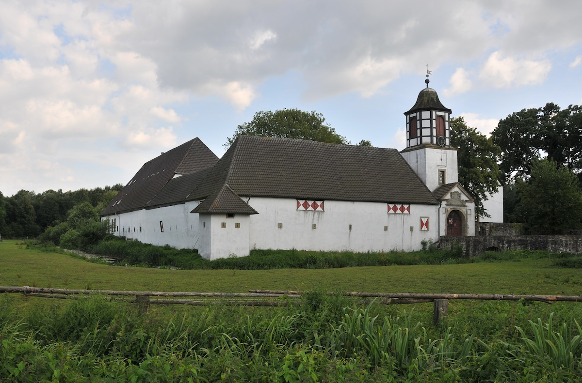 Schloss Barenau